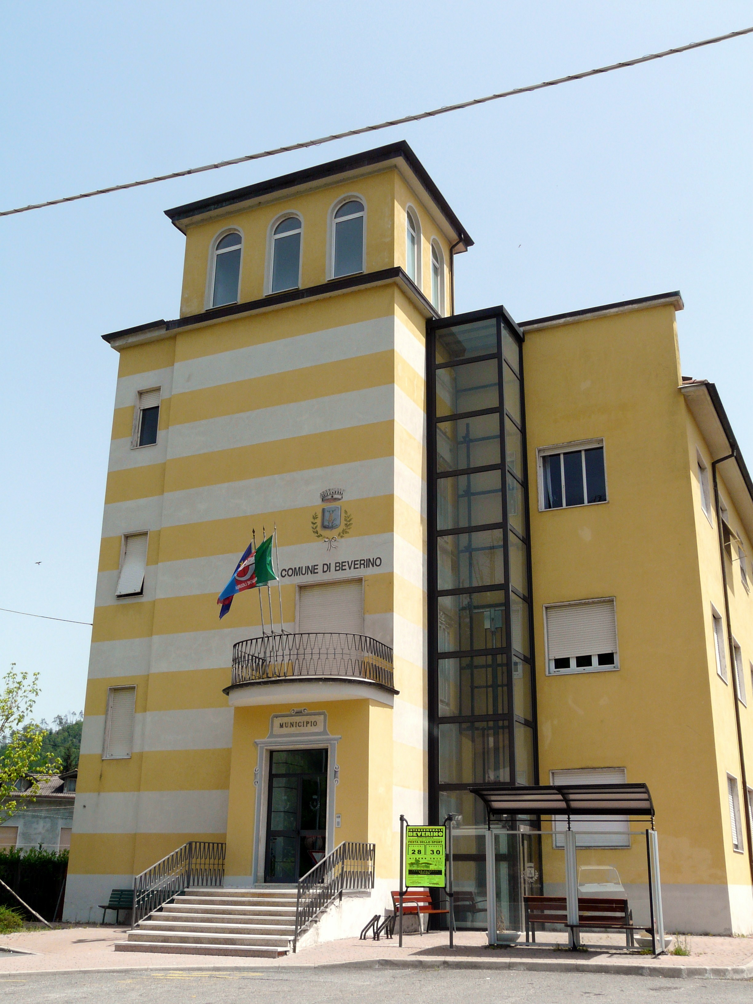 Il municipio di Beverino, Liguria, Italia